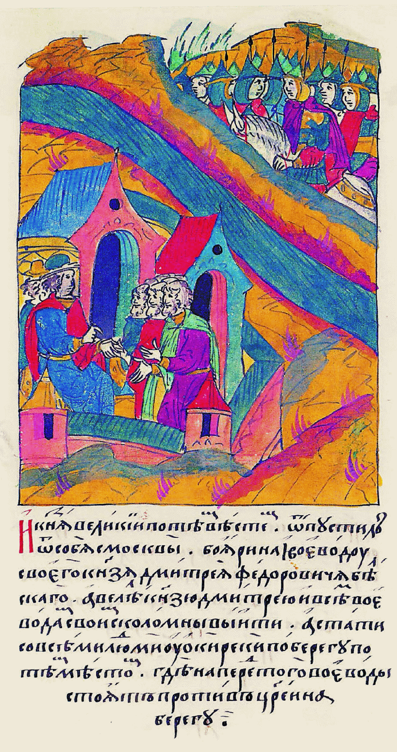 Миниатюра Лицевого летописного свода XVI в.: "И князь великий по тем вестям отпустил от себя из Москвы боярина и воеводу своего князя Дмитрия Федорови- ча Бельского, а велел князю Дмитрию и всем воеводам своим из Ко- ломны выйти, а встать со всеми людьми по берегу, по тем местам, где и раньше того во- еводы стоят против царей на берегу».